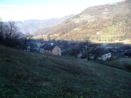 Један део села Петрича. Из приватног албума.